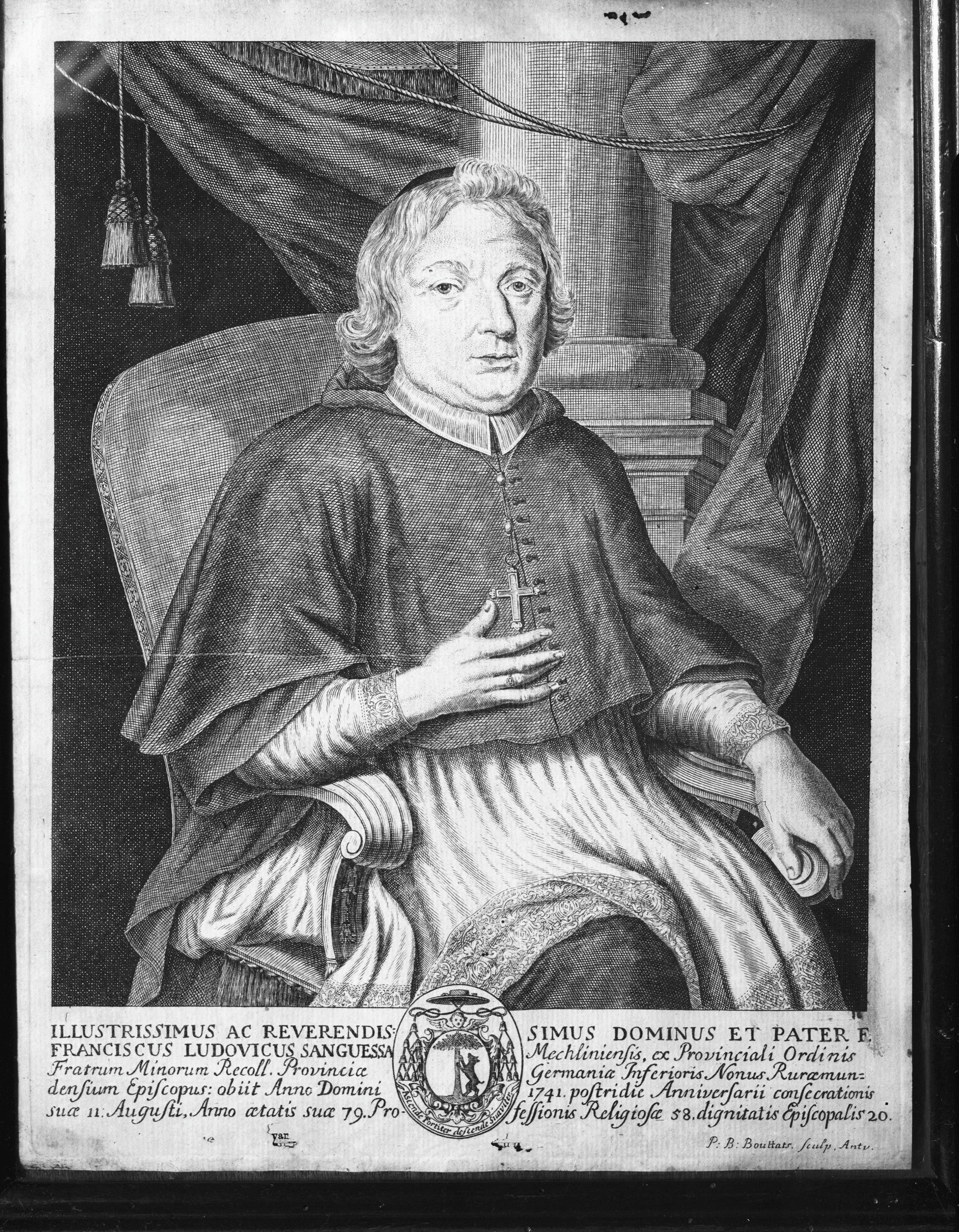 Pastorie Mozes en Aäronkerk: portret van Frans Lodewijk de Sanguessa